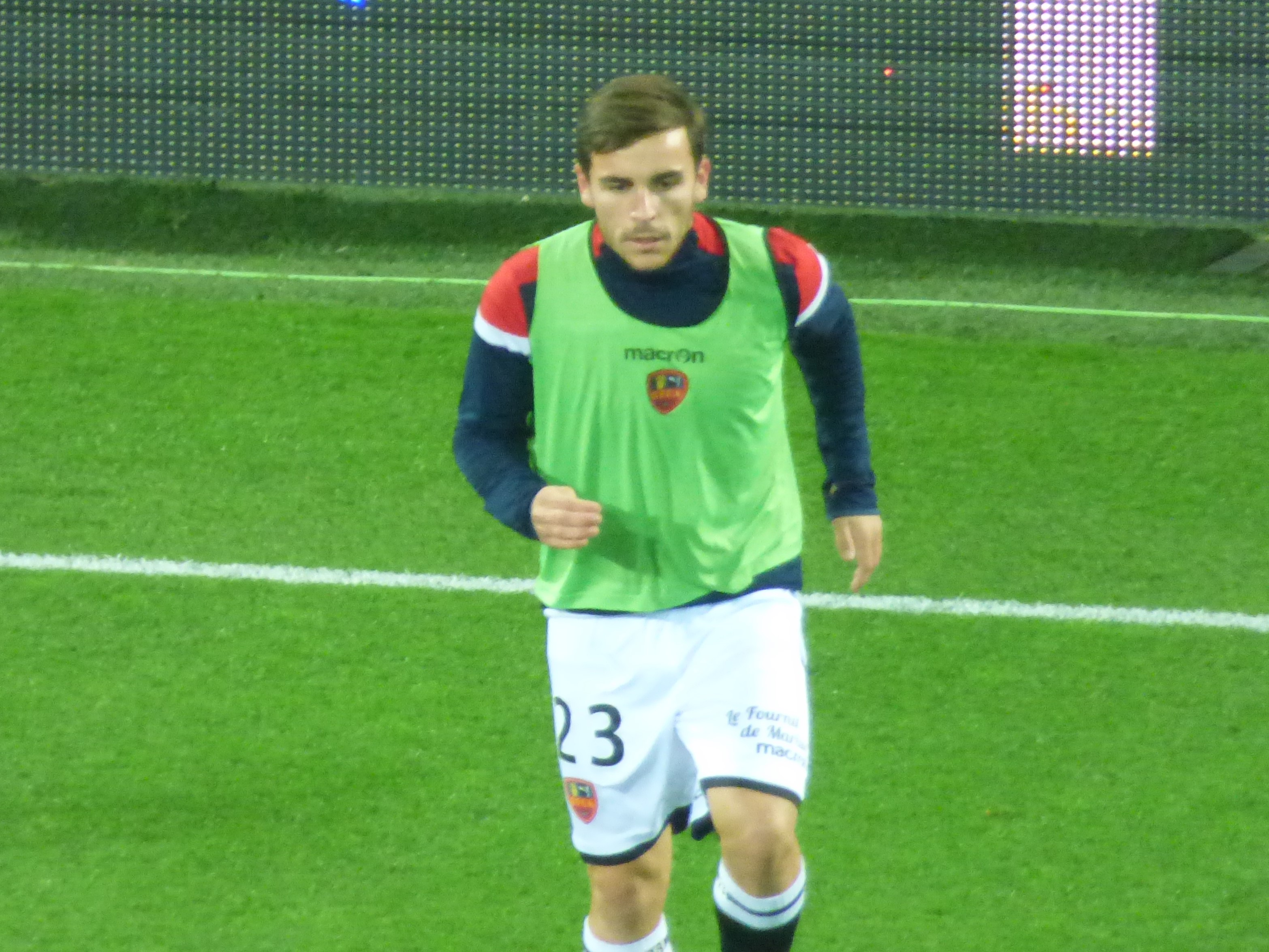 Julien Anziani avant le match RC Lens / GFC Ajaccio, comptant pour la onzième journée du championnat de France de Ligue 2 2018-2019 au Stade Bollaert-Delelis, le 22 octobre 2018.